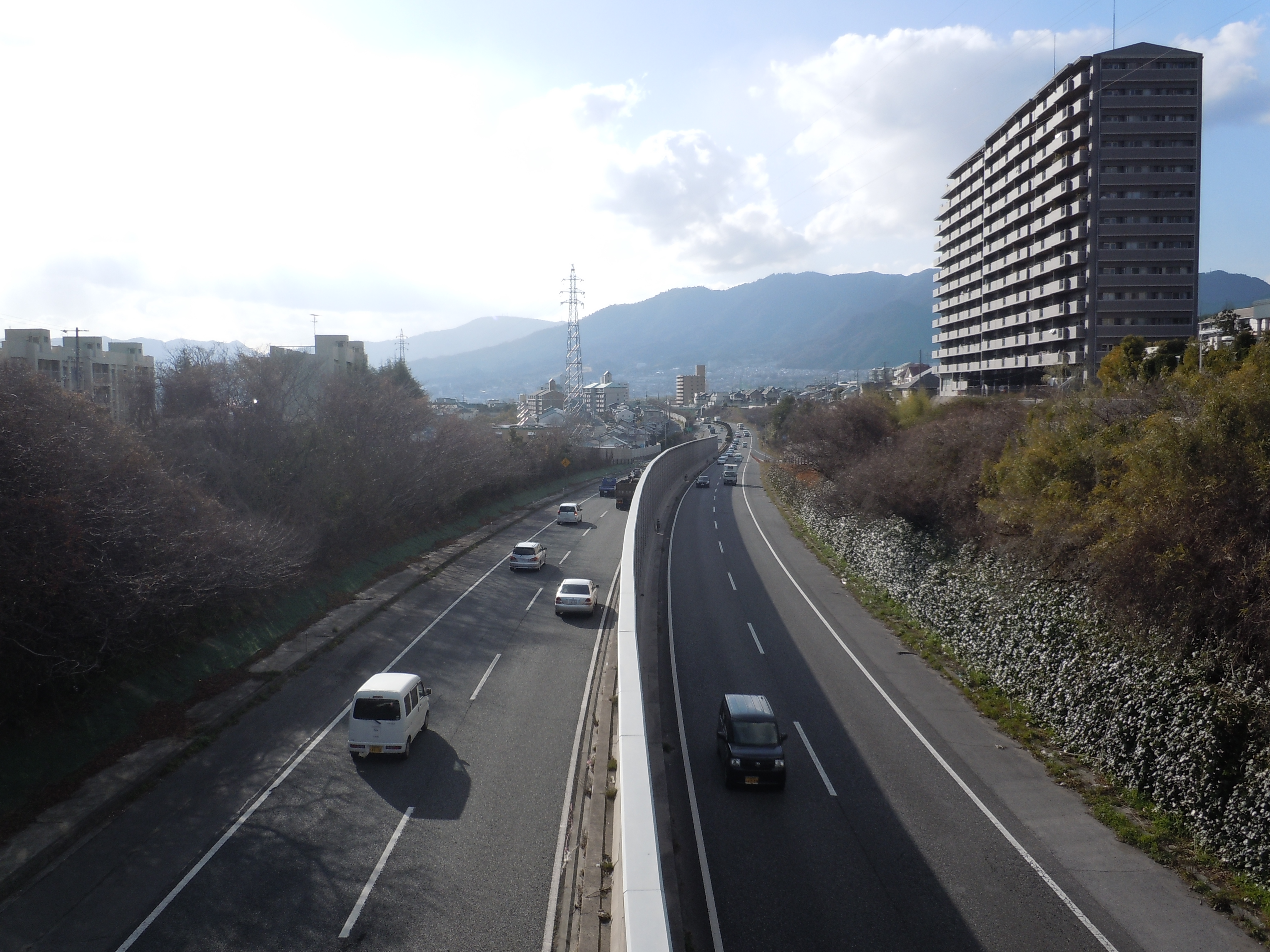 西広島バイパス井口ランプ付近。陸橋から撮影。